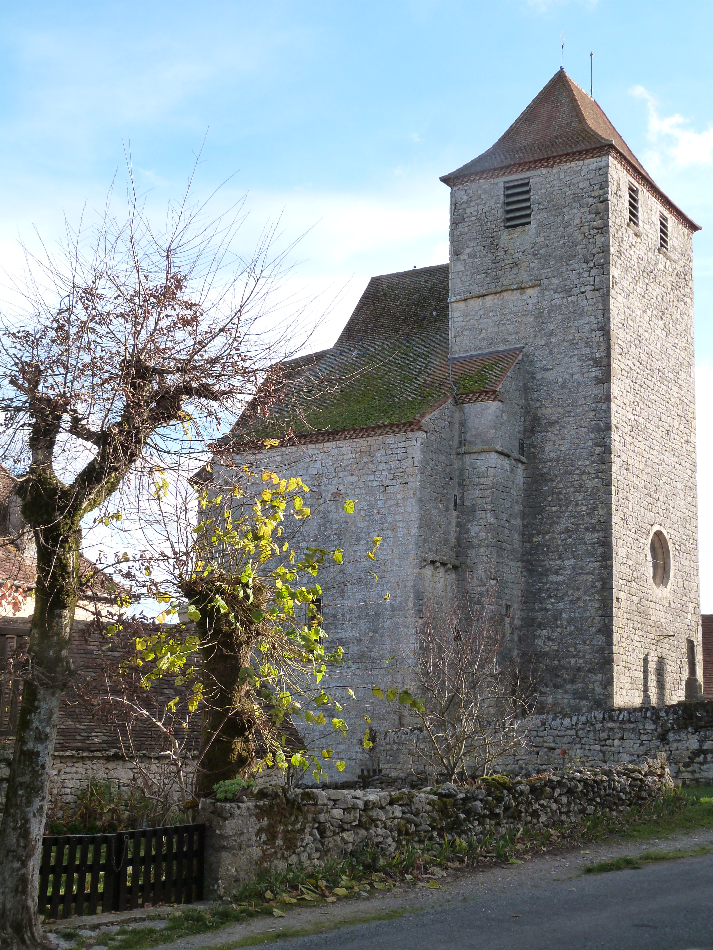 Eglise Saint-Martin à Séniergues